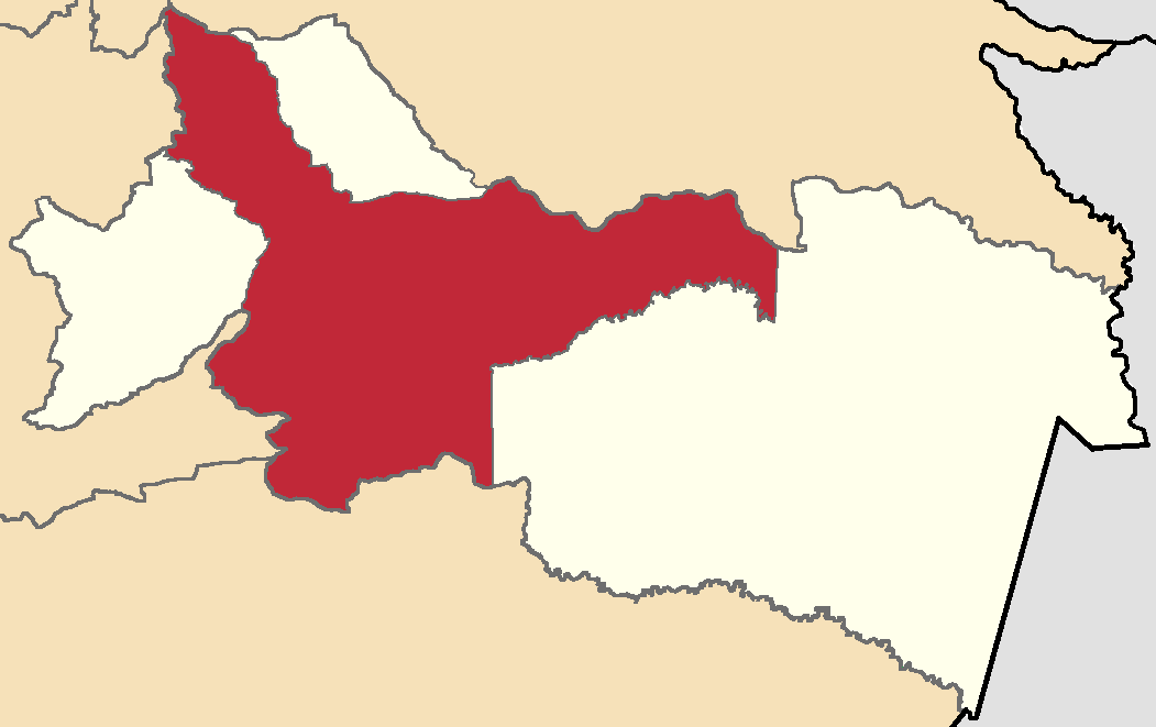 Mapa localizador del cantón en Orellana, Ecuador